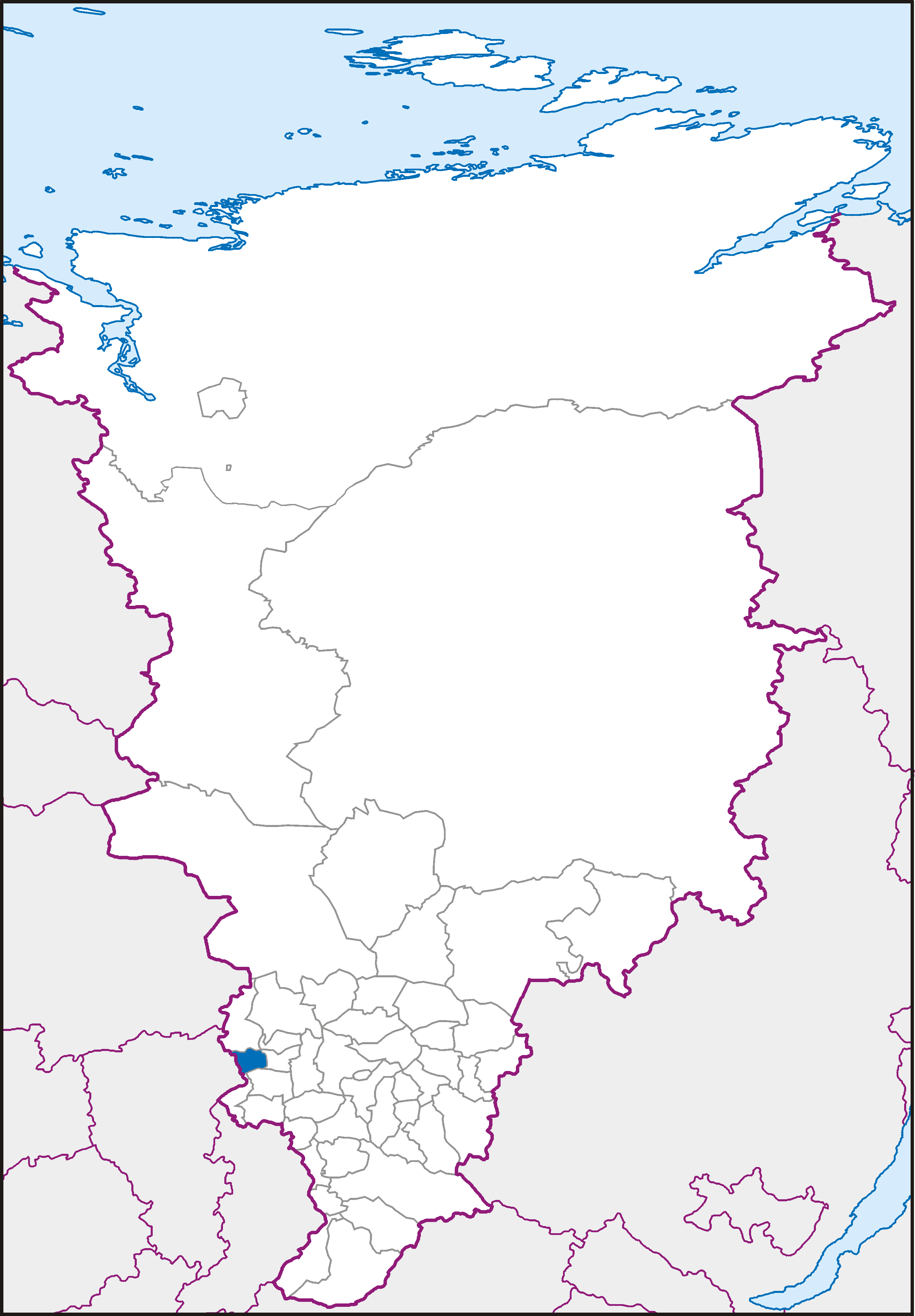 Положение Боготольского района на карте Красноярского края